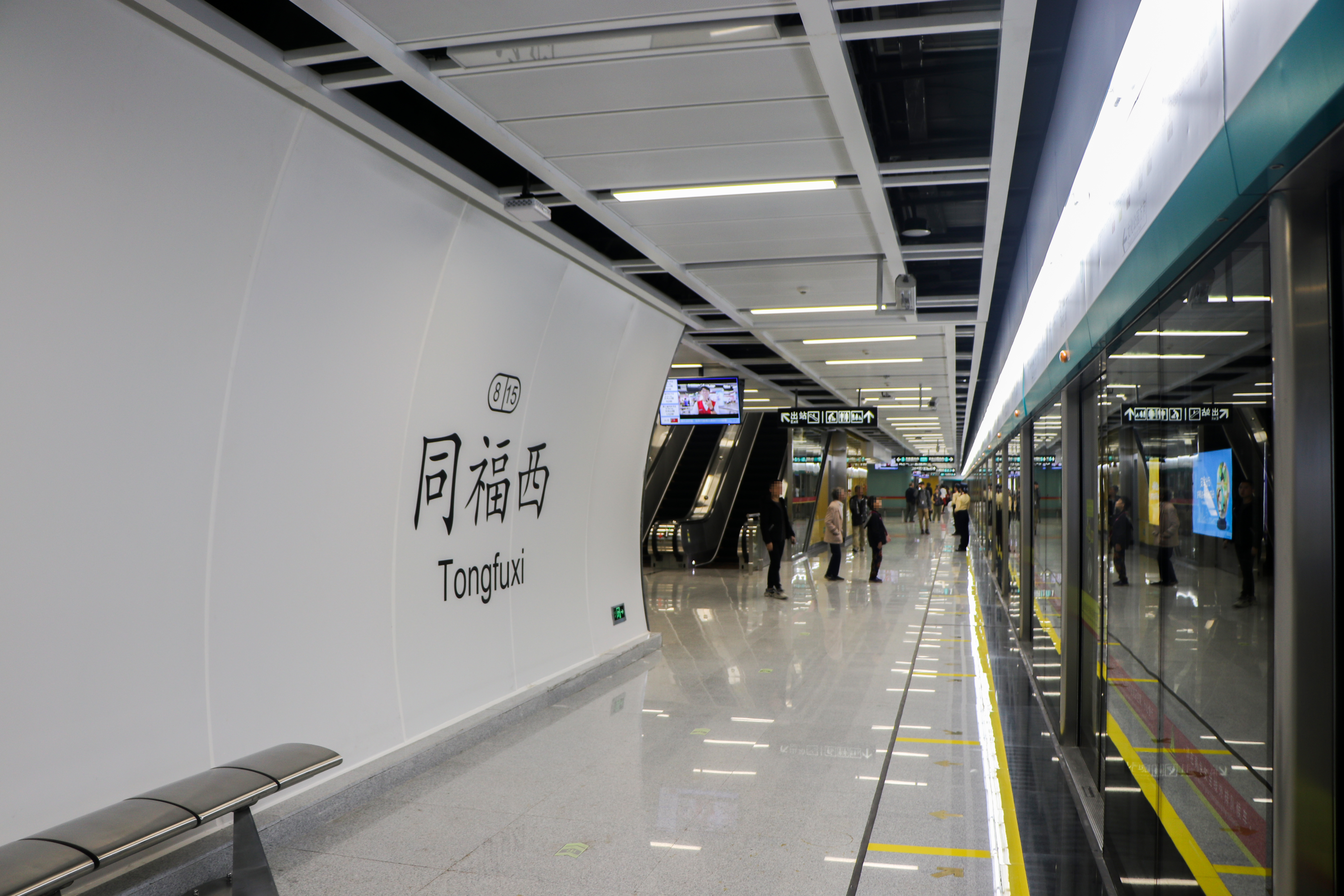 广州地铁同福西站